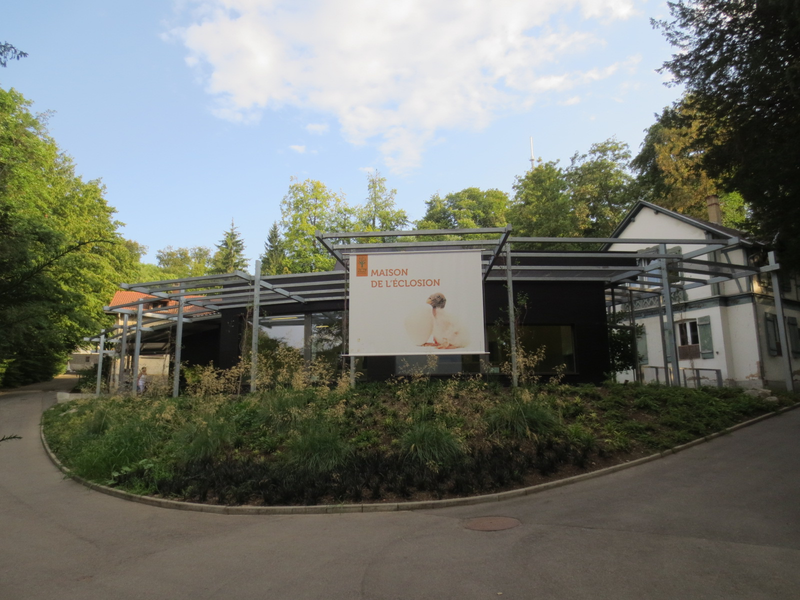 Parc zoologique de Mulhouse